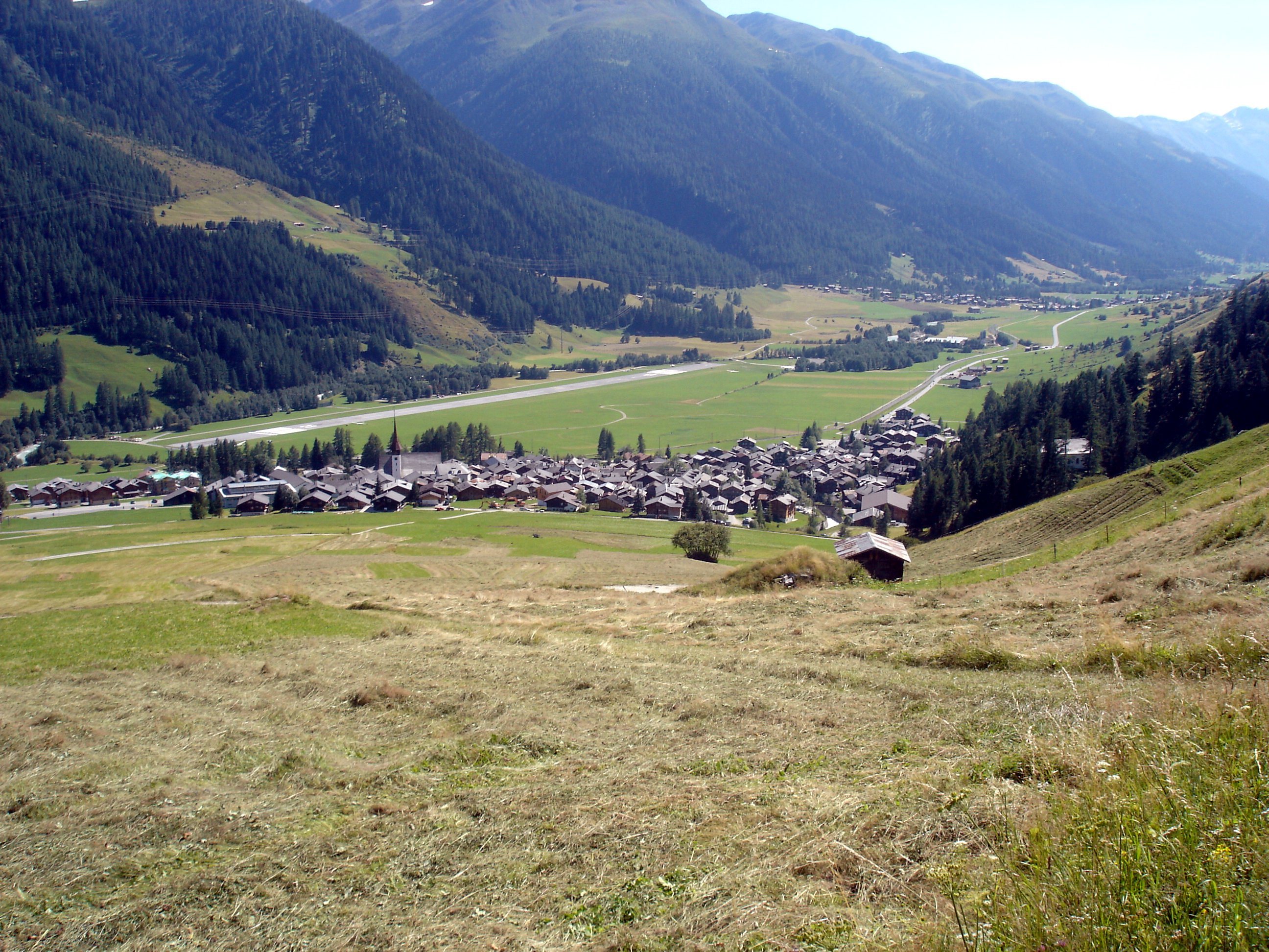 View of Münster VS